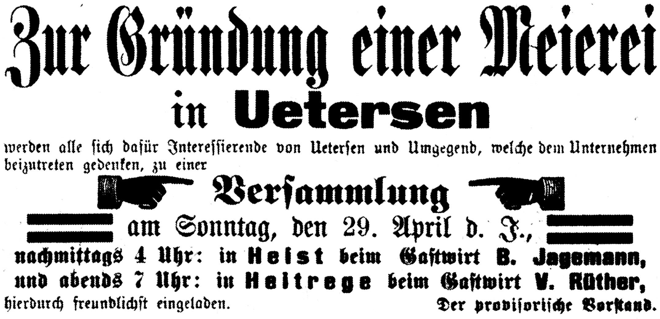 Zeitungsanzeige aus dem Uetersener Nachrichten vom 24. April 1894 für die Versammlung zur Gründung einer Meierei in Uetersen